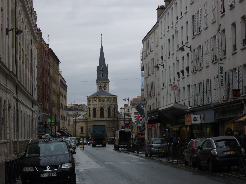 Paris 13e arrondissement - rue de Patay - vue vers le nord, au fond l'église Notre-Dame de la Gare